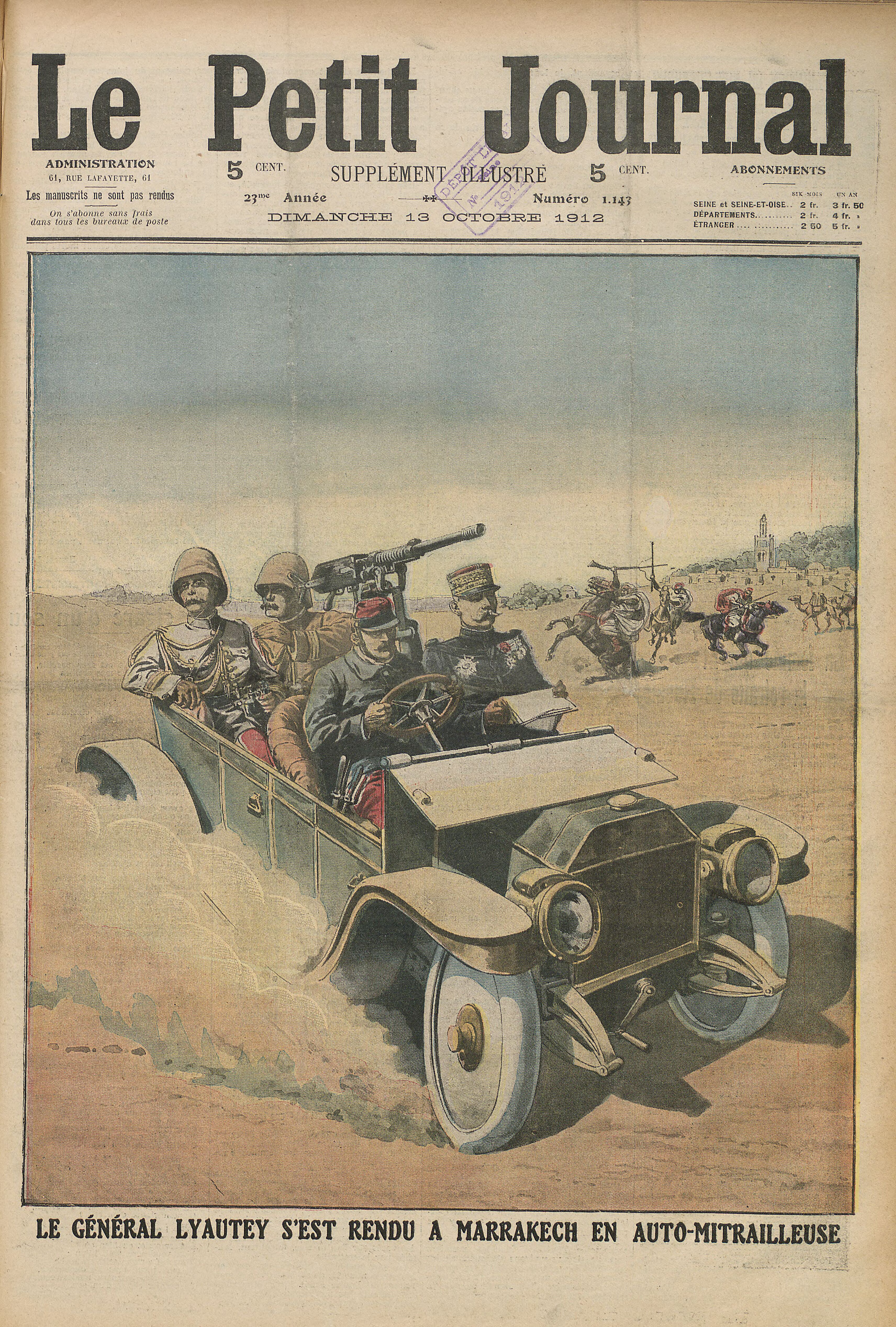 "Le général Lyautey s'est rendu à Marrakech en auto-mittrailleuse" ("General Lyautey reaches Marrakesh in an armored car") illustration published in Le Petit Journal, Paris, No.1147, 13 October 1912